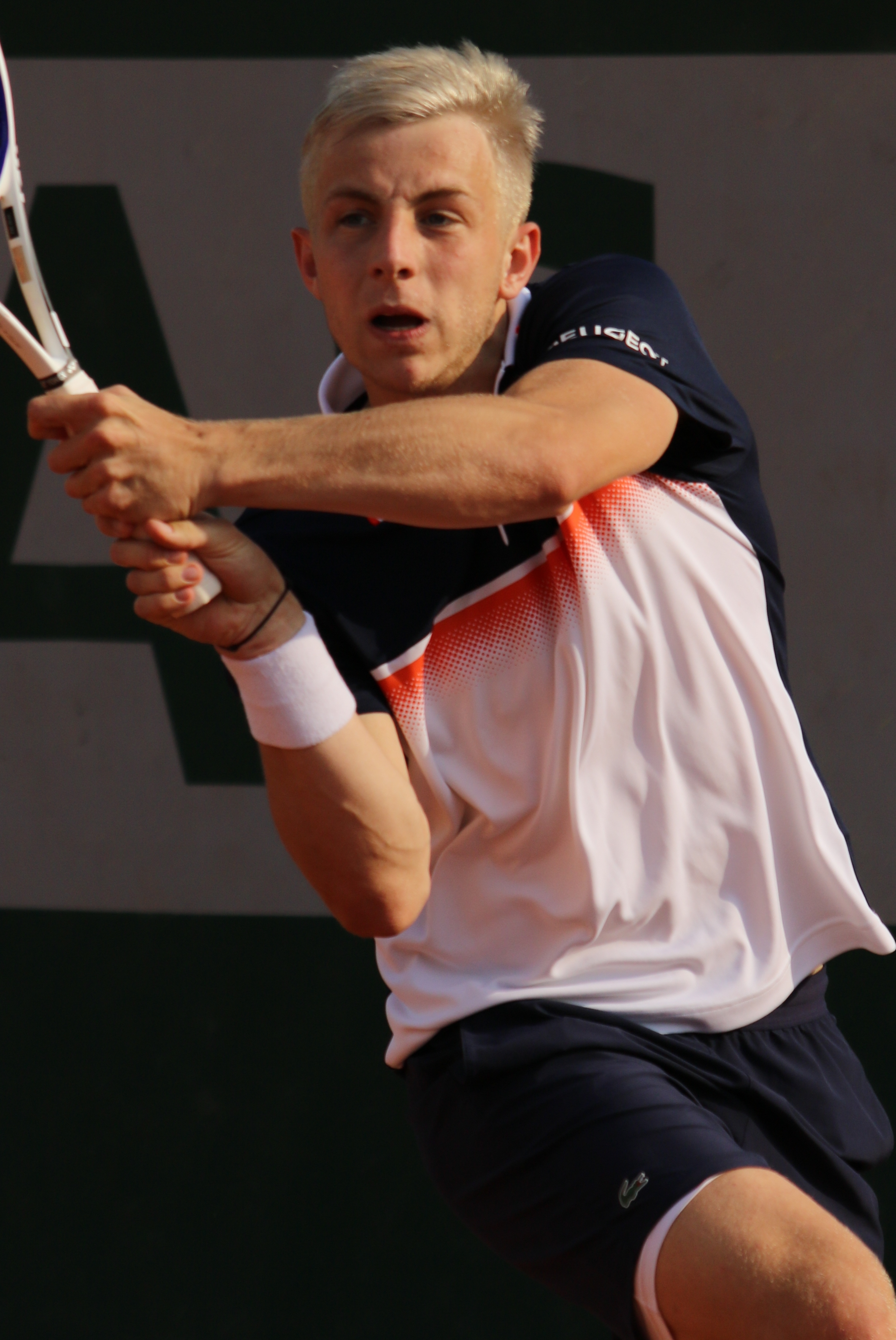 Griekspoor T. RGQ19 (20)